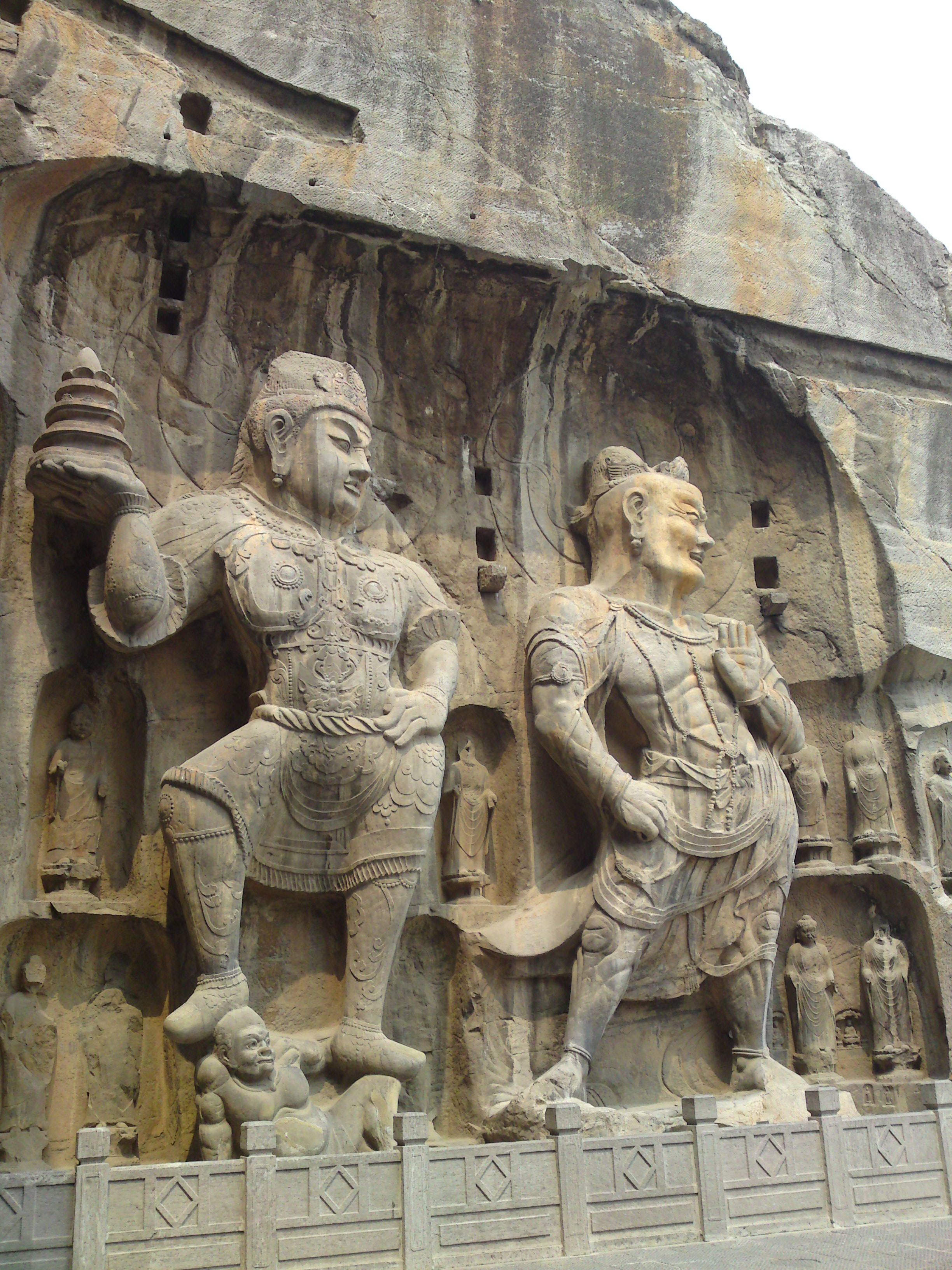 Guerriers protecteurs de bouddha, sur le site classé au patrimoine mondial de l'Unesco des grottes de Longmen. Luoyang. Chine.